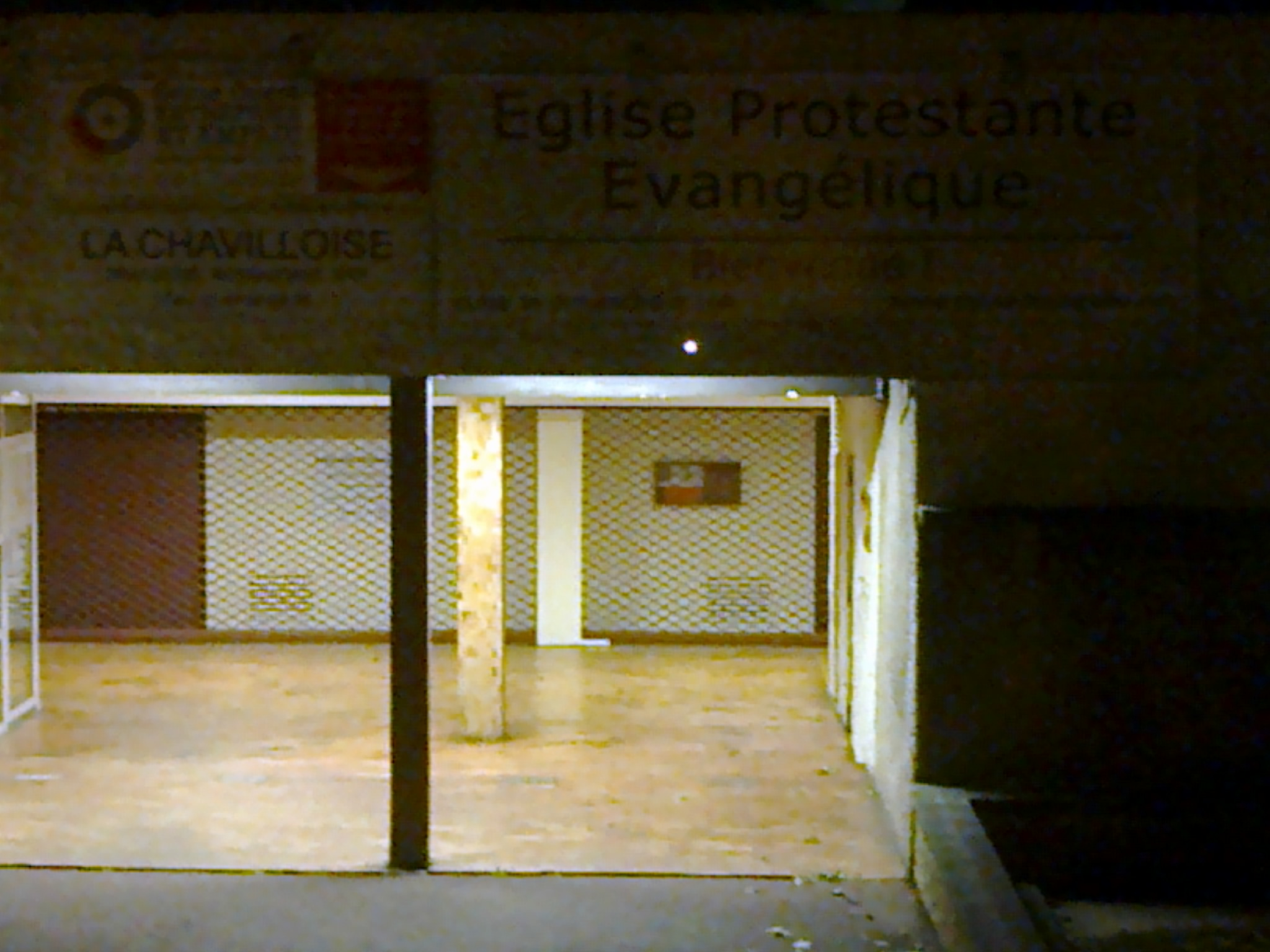 Eglise Protestante Evangélique à Chaville